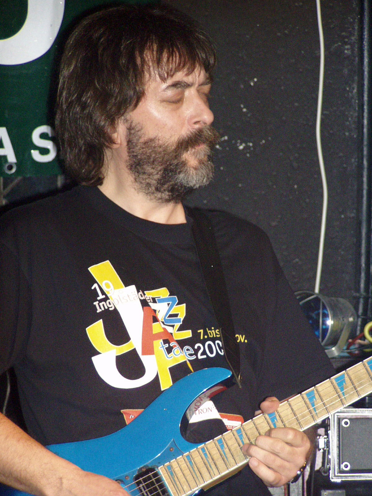 Krzysztof Ścierański, warsztaty gitarowe w pubie Blue Note w Mikołajkach